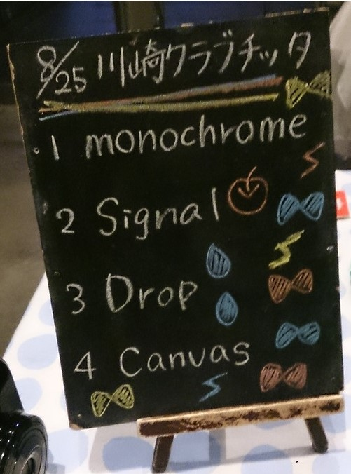 amiinaセトリボード(20150825(1))